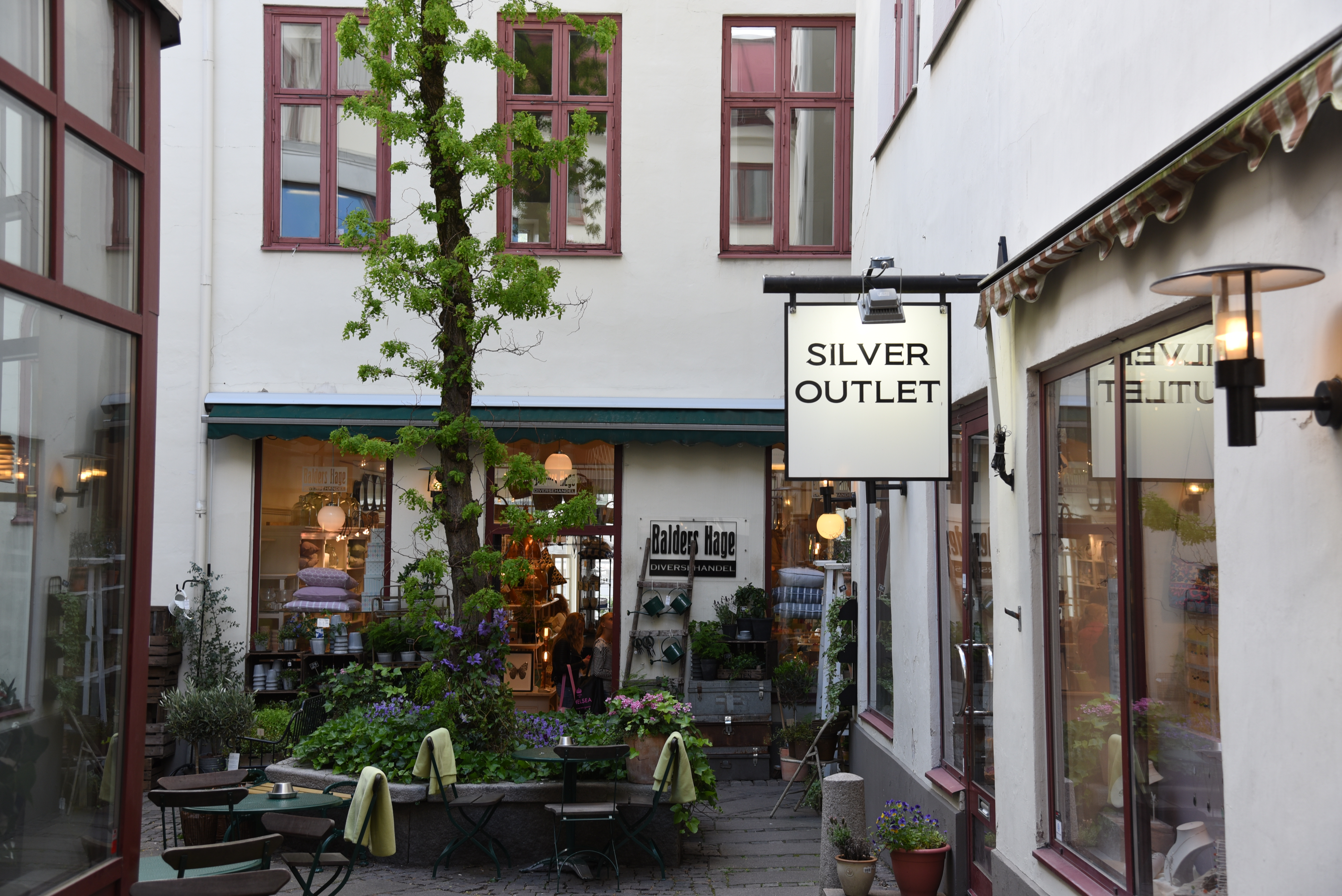 Gården till Åkermanska huset i 15 kvarteret Frimuraren i stadsdelen Inom Vallgraven i Göteborg.